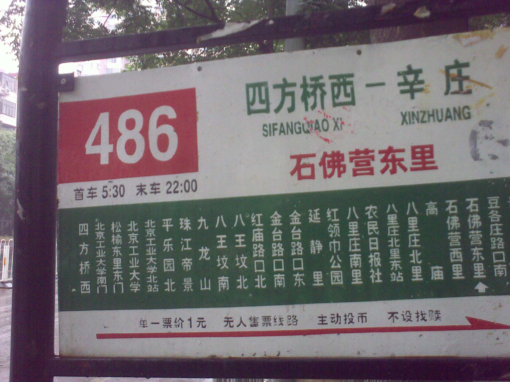 Beijing Bus 486 Sign at Shifoying Dongli.